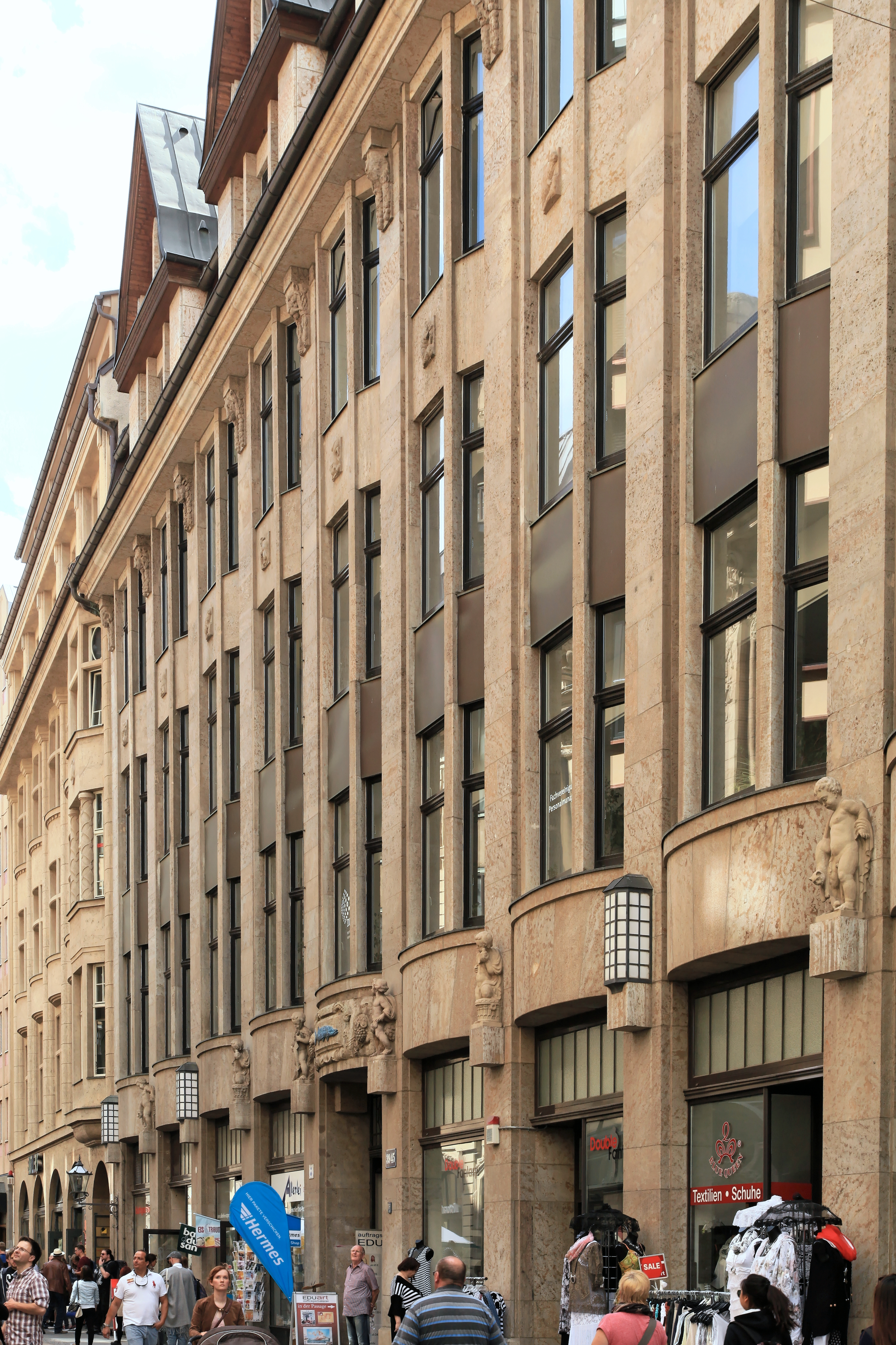 Blauer Hecht, Nikolaistraße 39-41-43-45 in Leipzig